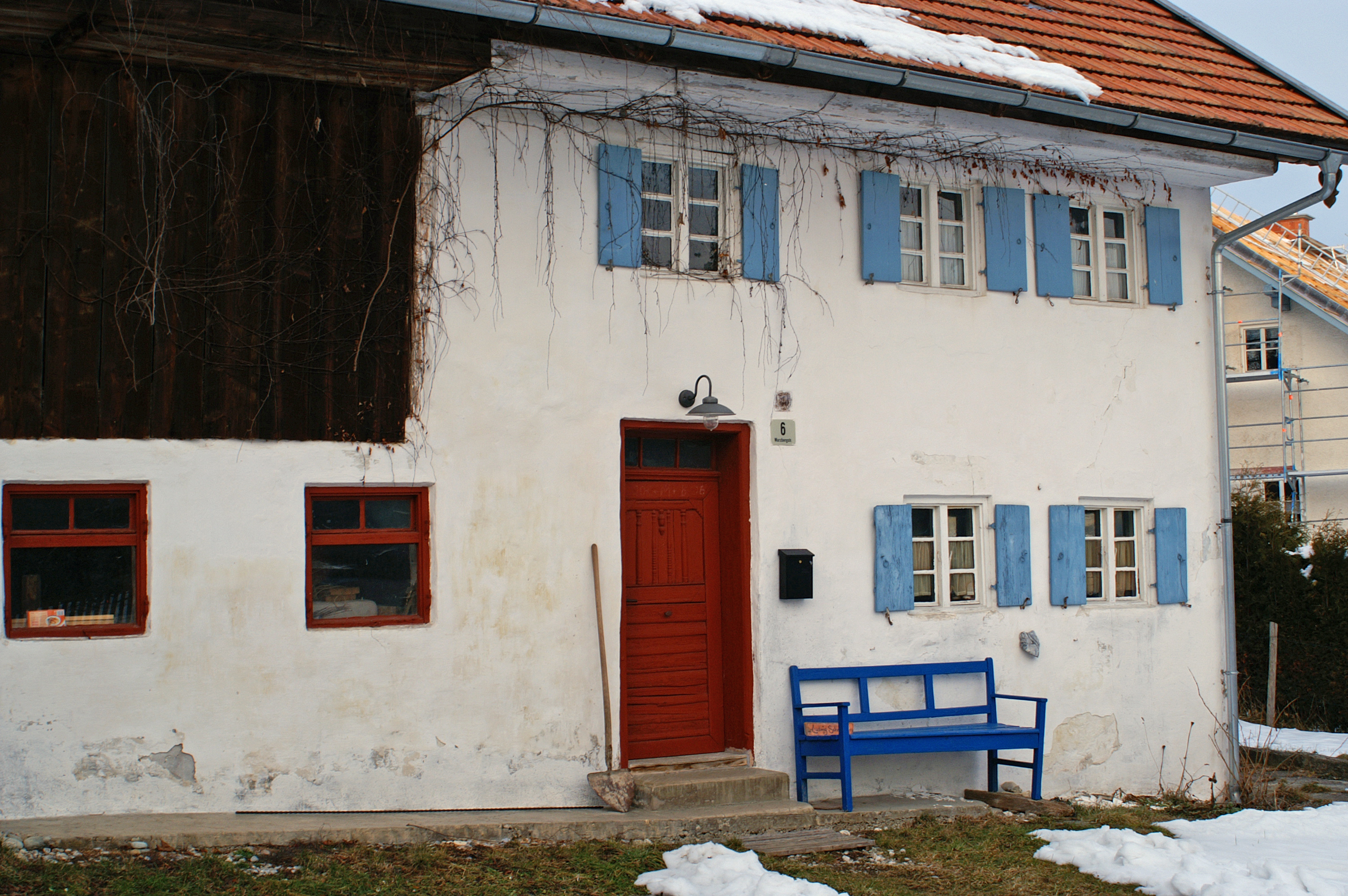 Wurzbergstr. 6 in Reichling